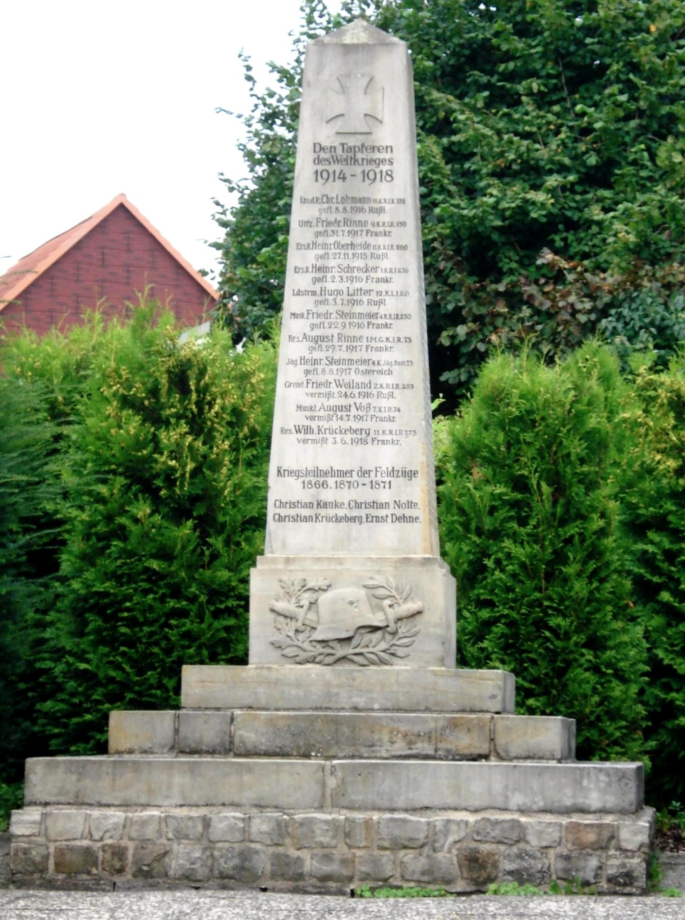 Kriegerehrenmal in Messenkamp